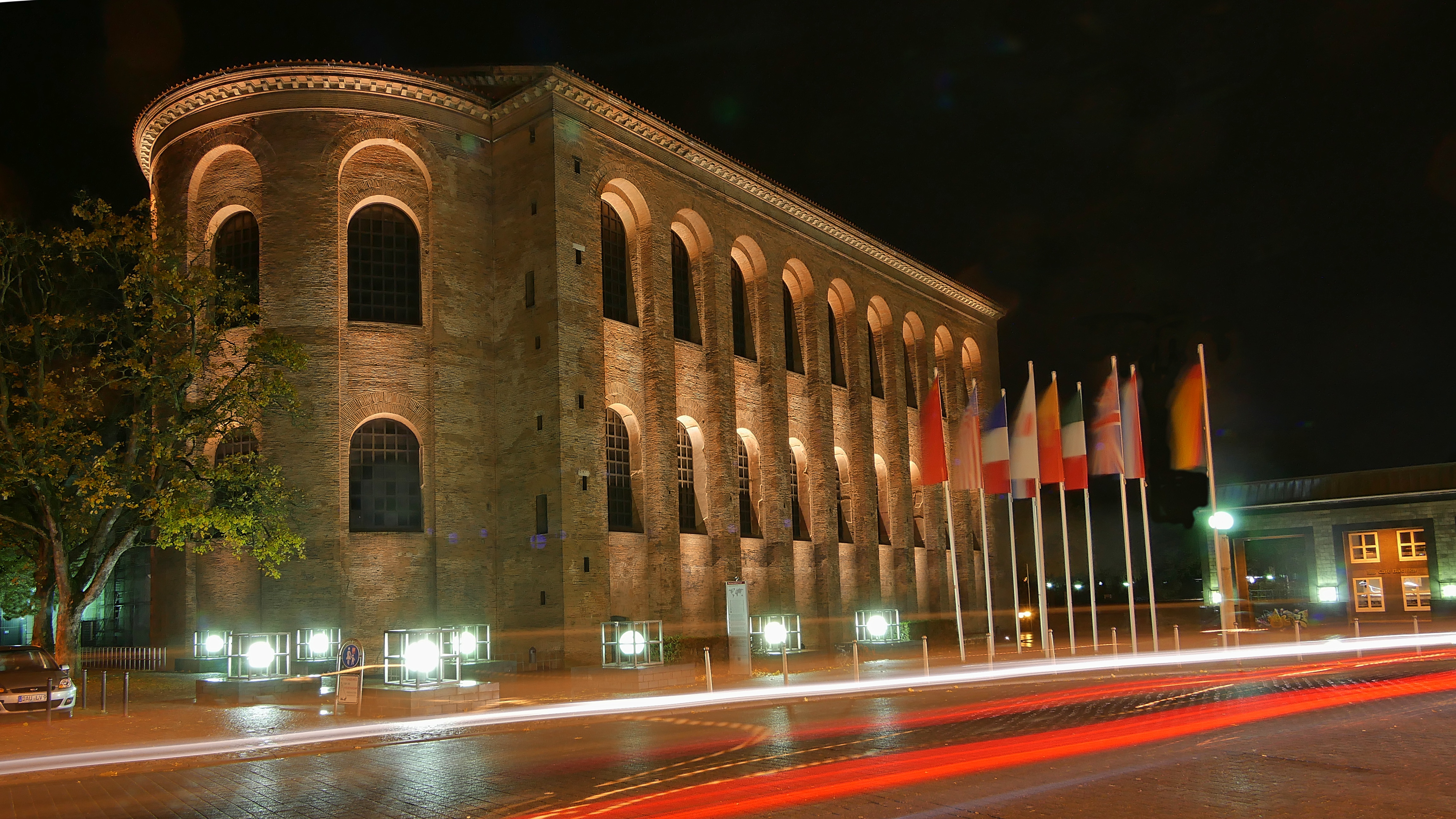 Konstantinbasilika Trier, neue Illumination seit dem 31. Oktober 2017